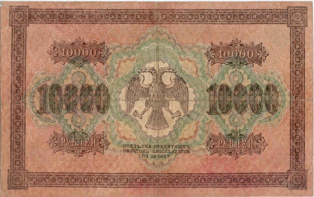 10 000 рублей несуществующего Временного правительства 1918 года. Реверс